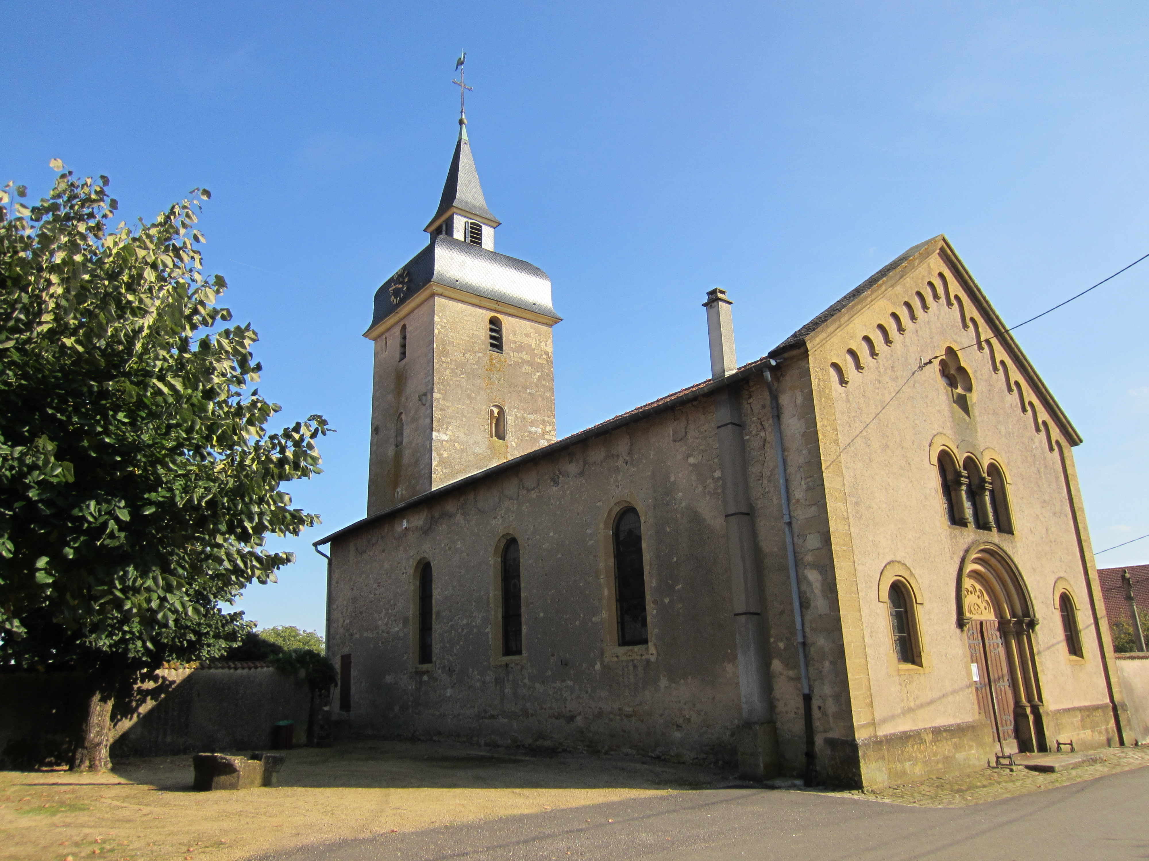 Description Église Saint-Clément Vionville Date25 September 2011Sourcemon appareil photoAuthorAimelaimePermission (Reusing this file) Église Saint-Clément Vionville